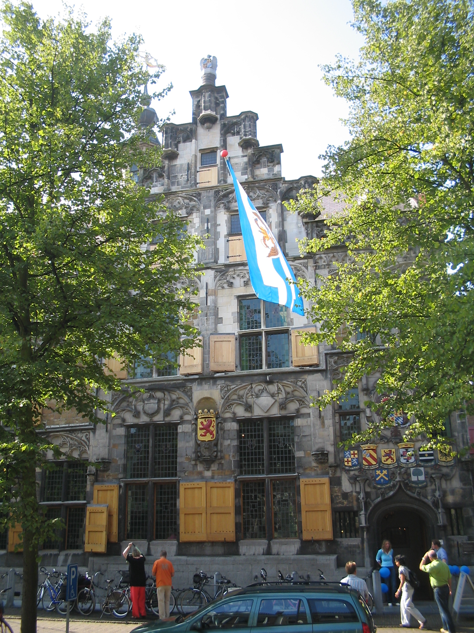 Gemeenlandshuis, Delft. Sept. 2005